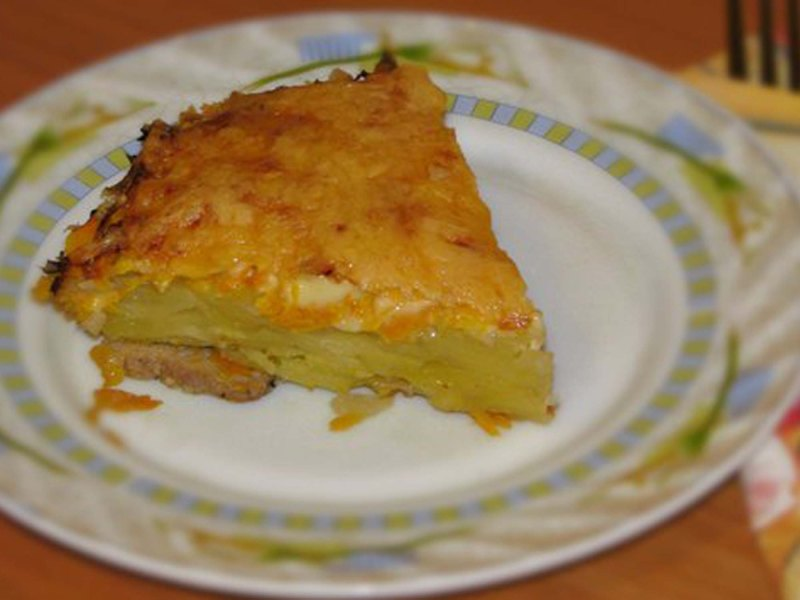 uncnown